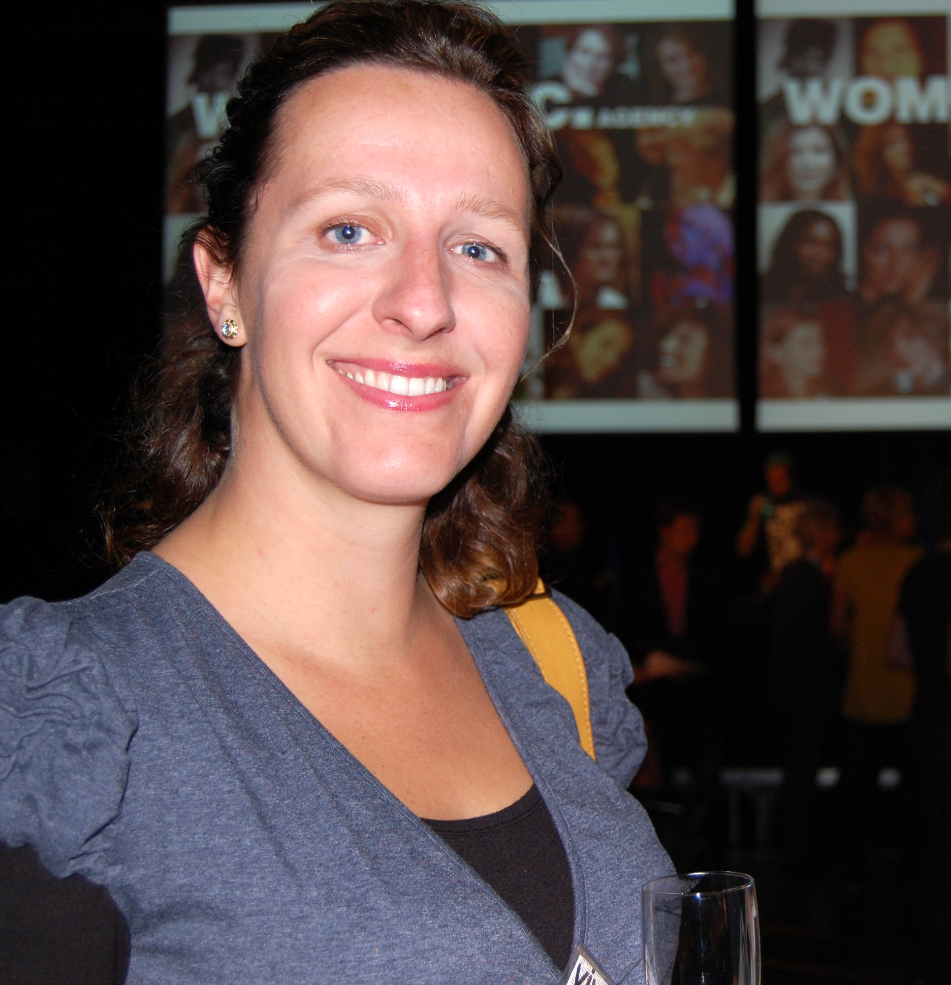 Aaf Brandt Corstius (Haarlem, 3 maart 1975) is een Nederlands columniste, vertaalster, schrijfster, publiciste en redactrice.